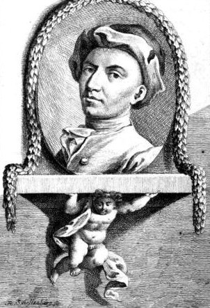 Portrait des Schweizer Kunstmalers Luca Antonio Colomba.